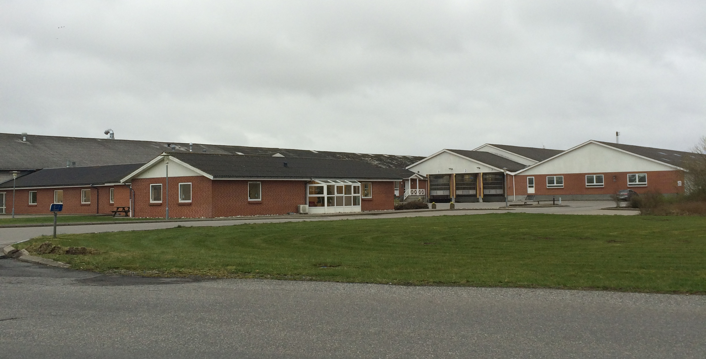 Hedegaard Foods's hovedsæde på Glerupvej i Hadsund.